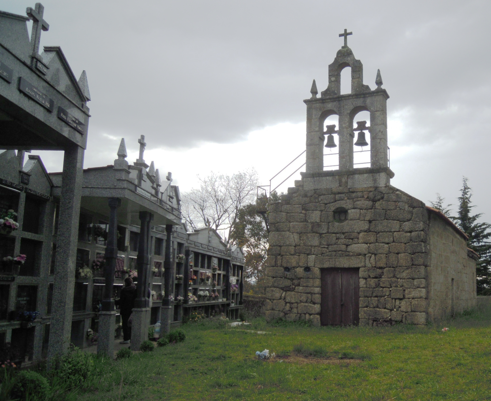 Igrexa no camposanto de Faramontaos (Carballeda de Avia).